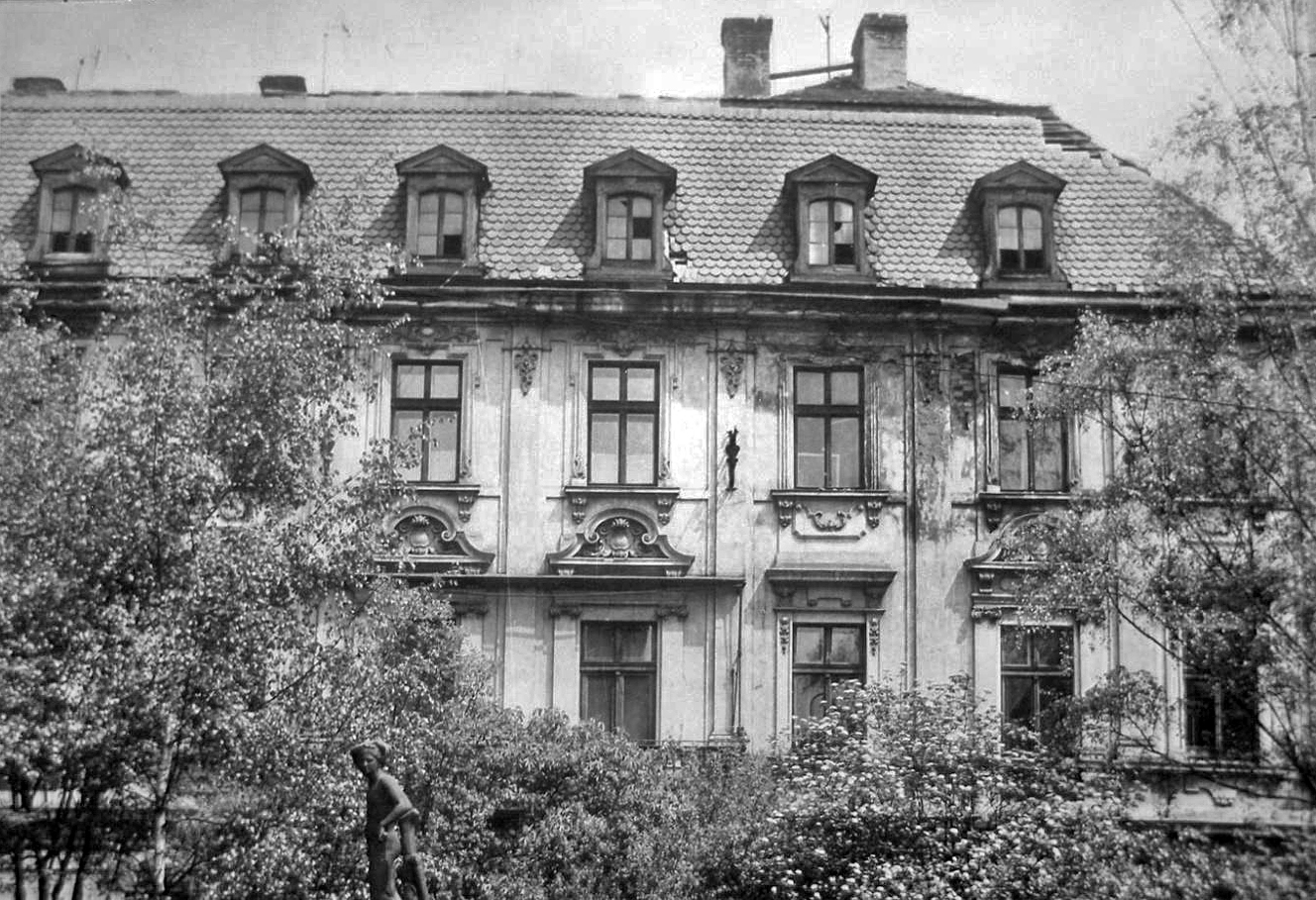 Stadthaus „Zum russischen Zaren“ am Laube-Platz in Teplitz – Teplice, Laubeho nám./ Mlýnská 330, errichtet 1900 für Franz Carl Stradal (1847–1901), Rechtsanwalt und Stadtverordneter in Teplitz, Architekt: Max von Loos (in den 1980er Jahren zerstört)